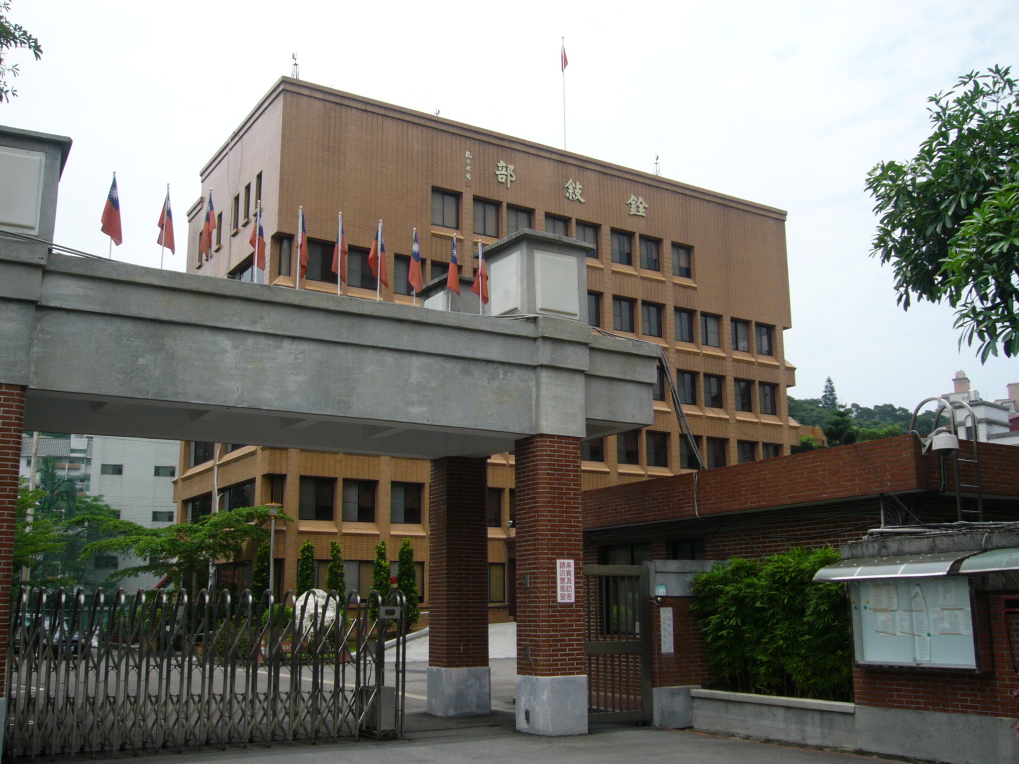 位於臺灣臺北市文山區試院路的中華民國銓敘部大樓